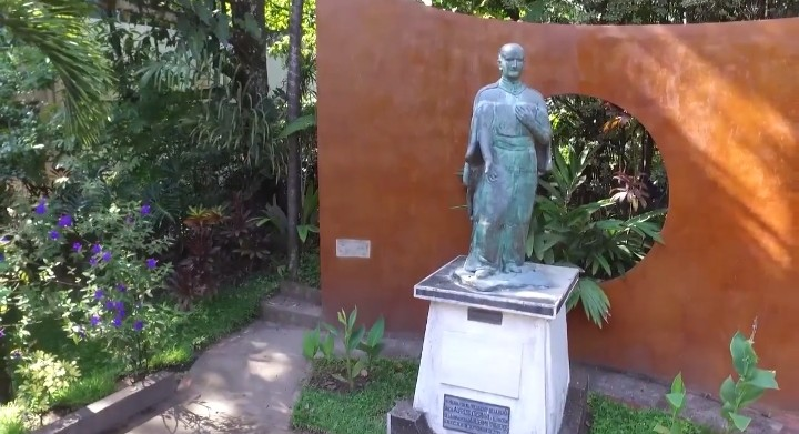 estatua de jose matias delgado en la universidad que lleva el mismo nombre